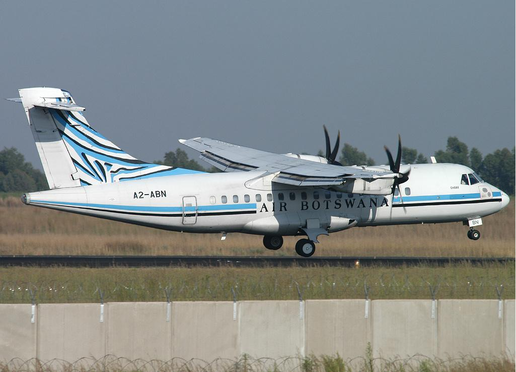 Cette photo est une photo d'un ATR 42 de Air Botswana prise le 12 mars 2007